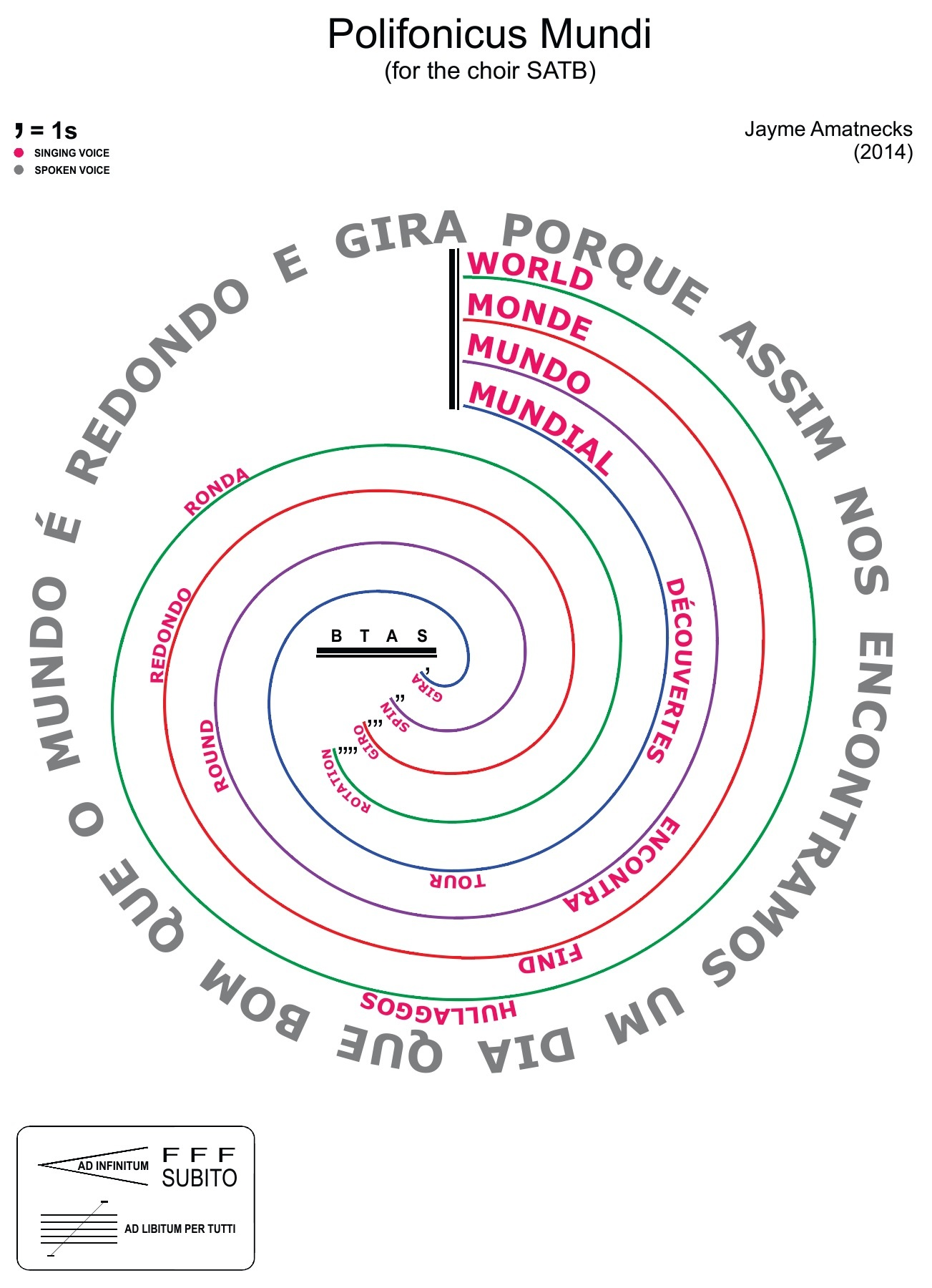 Imagem da música Polifonicus Mundi de Jayme Amatnecks